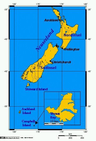 Campbell Island Kartenskizze selbst erstellt unter Zuhilfenahme von Online Map Creation